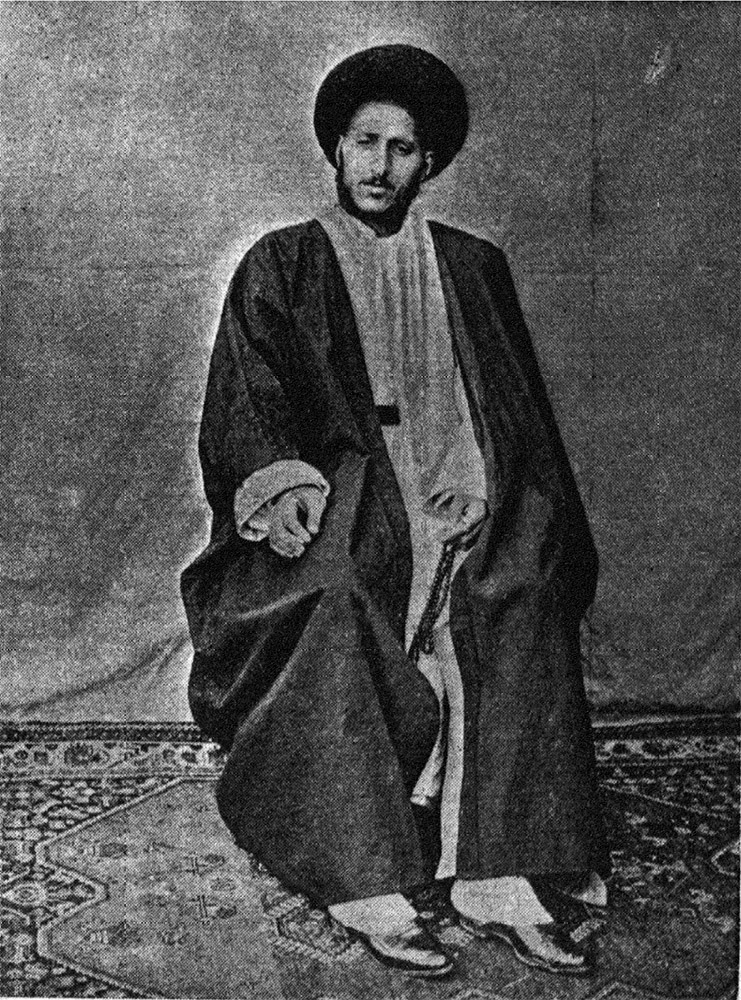 میرهاشم دوچیی (سیدهاشم تبریزی) موسس انجمن اسلامیه تبریز